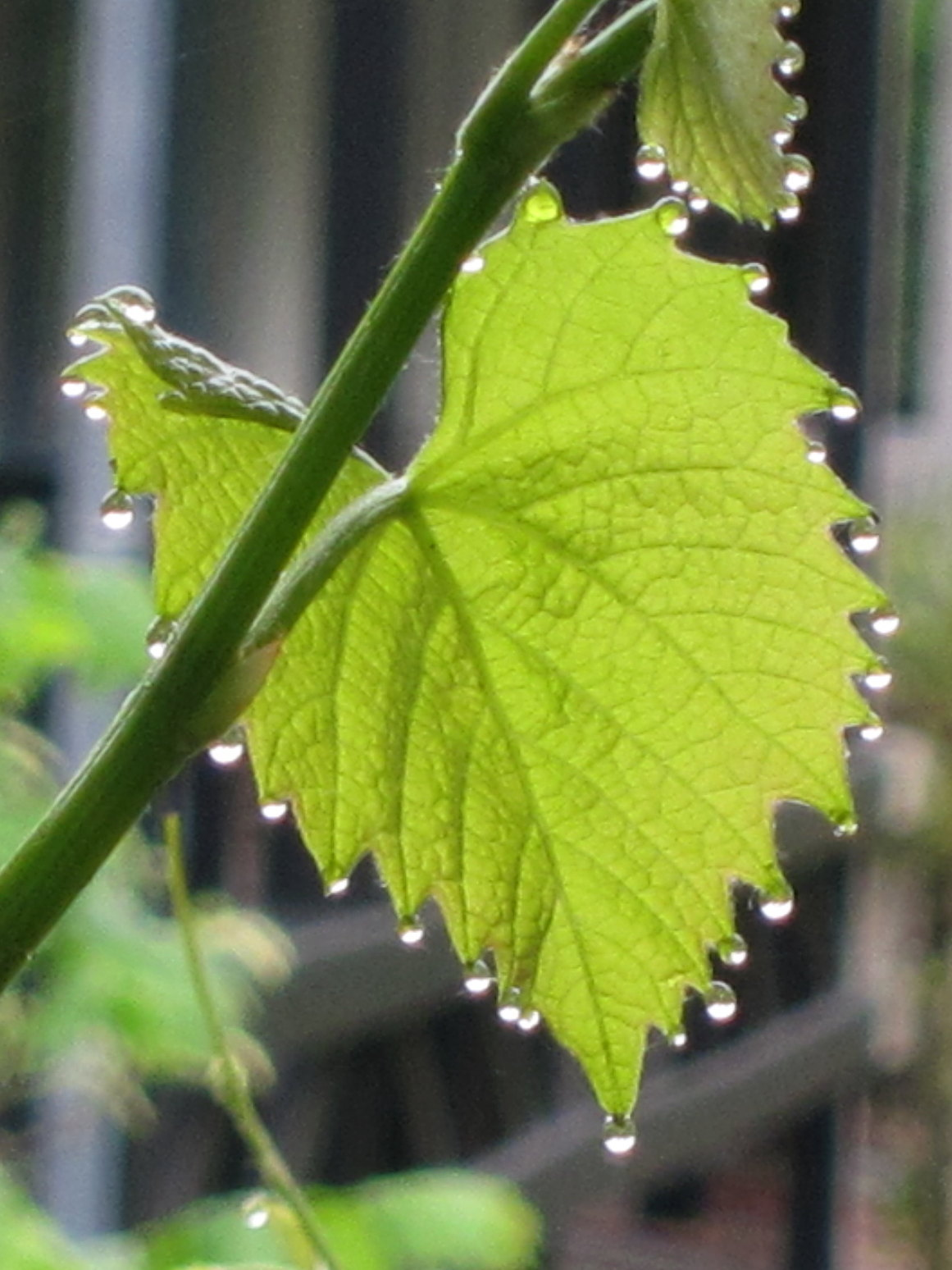 Weinblatt mit Tautropfen, München, RH-Südseite